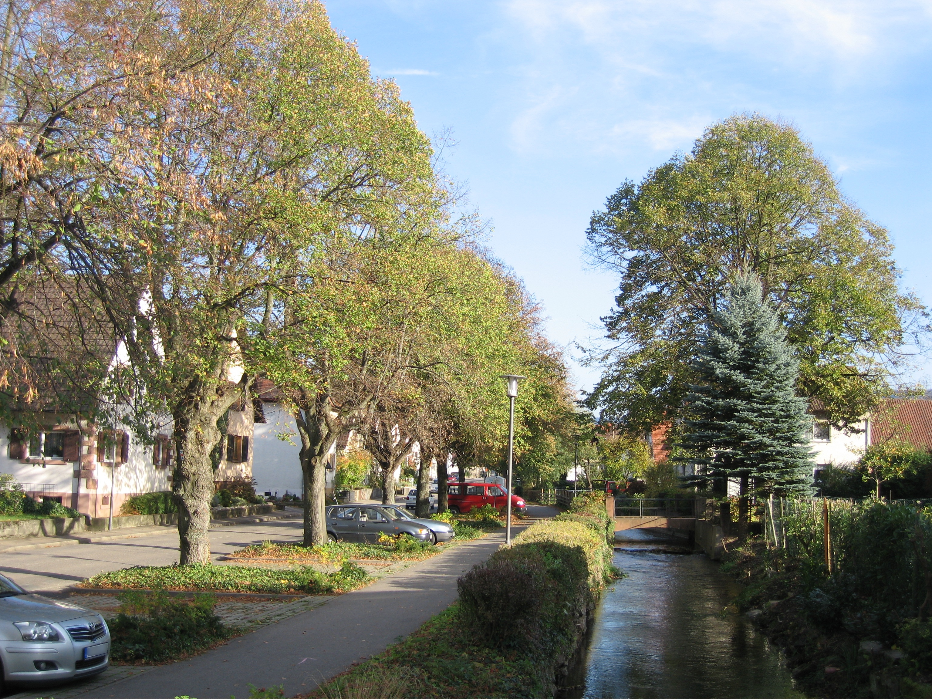 Glotterbach in Denzlingen